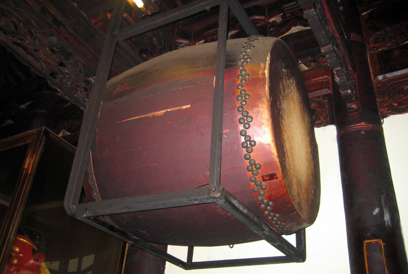 南瑤宮有鼓無鐘